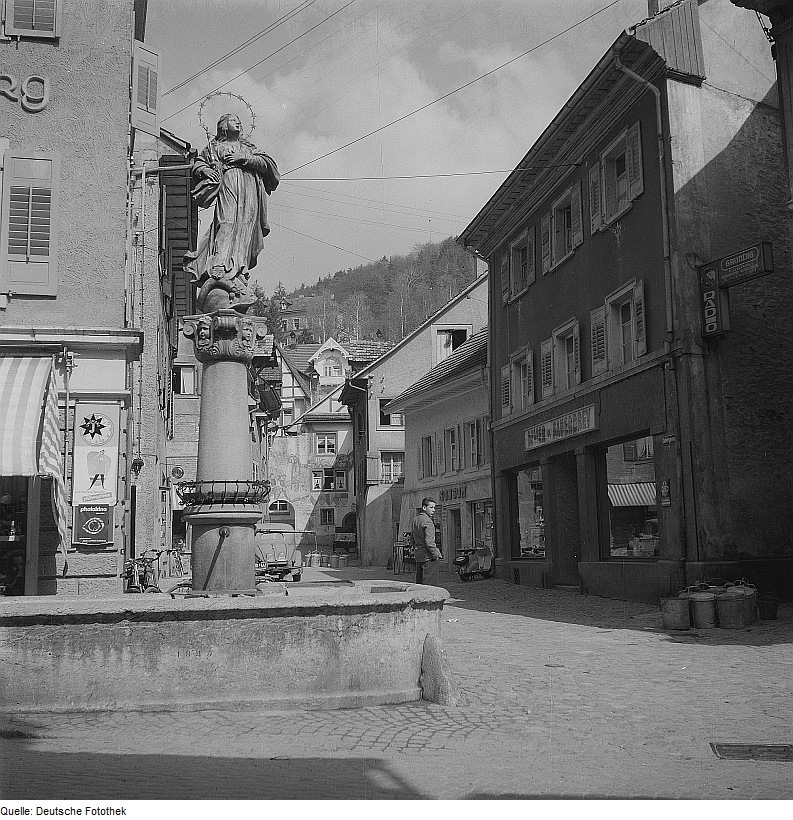 Original image description from the Deutsche Fotothek Tiengen (Hochrhein). Blick auf einen Brunnen und in eine Straße